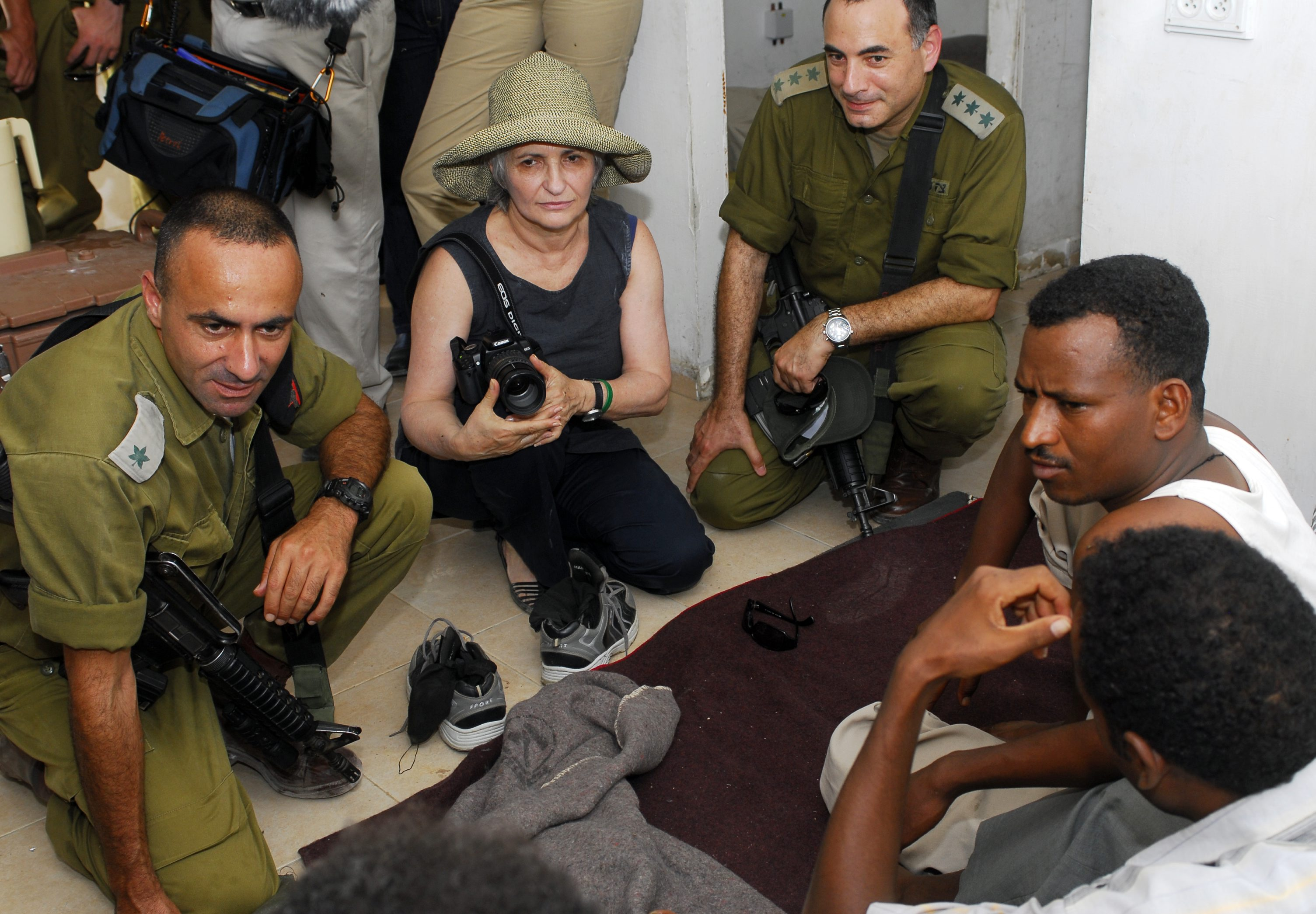 PM'S WIFE ALIZA OLMERT TOURS ALONG THE ISRAELI- EGYPTIAN BORDER WHERE SUDANESE REFUGEES HAD CROSSED THE BORDER. IN PHOTO, MRS. OLMERT MEETS WITH SUDANESE REFUGEES. סיור רעיית ראש הממשלה הגב' עליזה אולמרט בגבולה הדרומי של מדינת ישראל, בנתיב החדירה של פליטים מסודן. בצילום, הגב' אולמרט משוחחת עם פליטים אשר חצו את גבול ישראל ונתפסו על ידי כוחות צה"ל. Photograph: OHAYON AVI, GPO. 19/07/2007